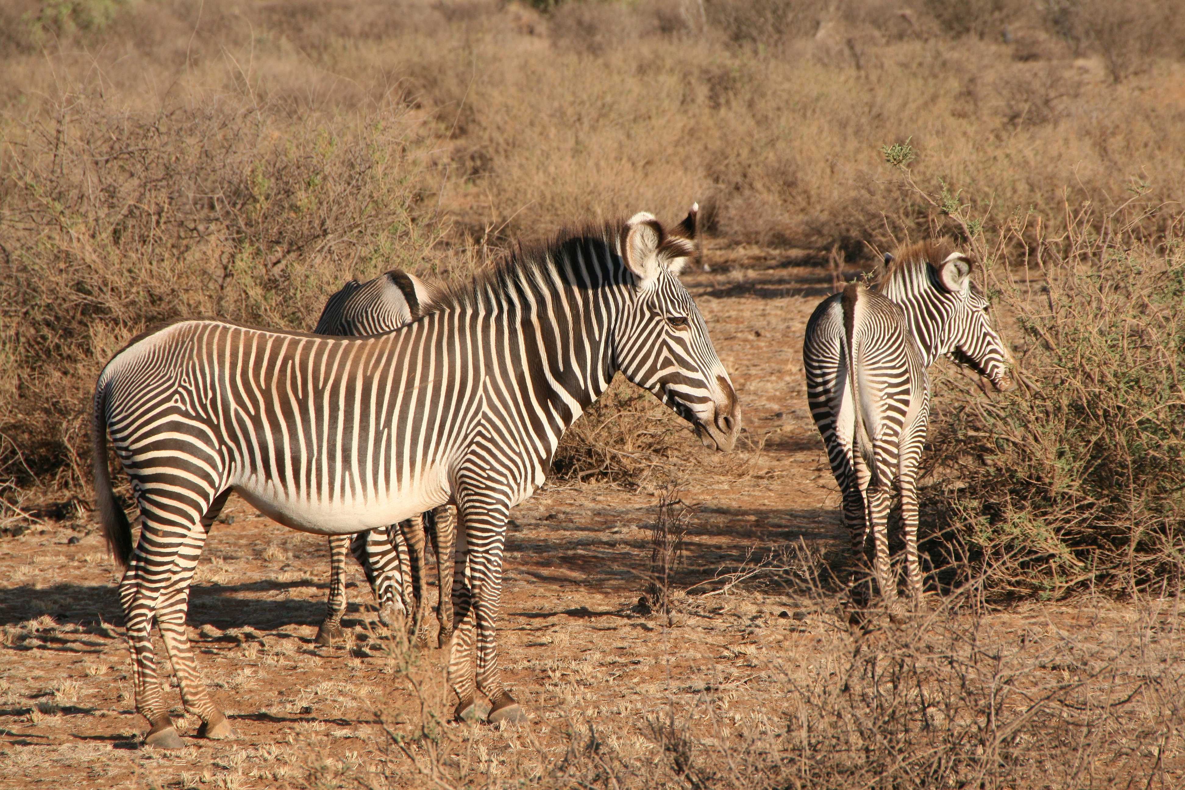 Zèbre de Grévy dans la réserve nationale de Samburu